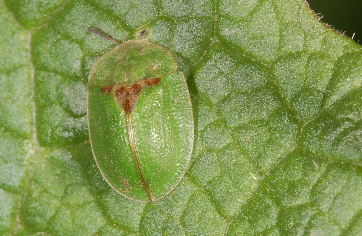 Cassida spec., Selzerbrunnen, Nied, Frankfurt am Main, Deutschland